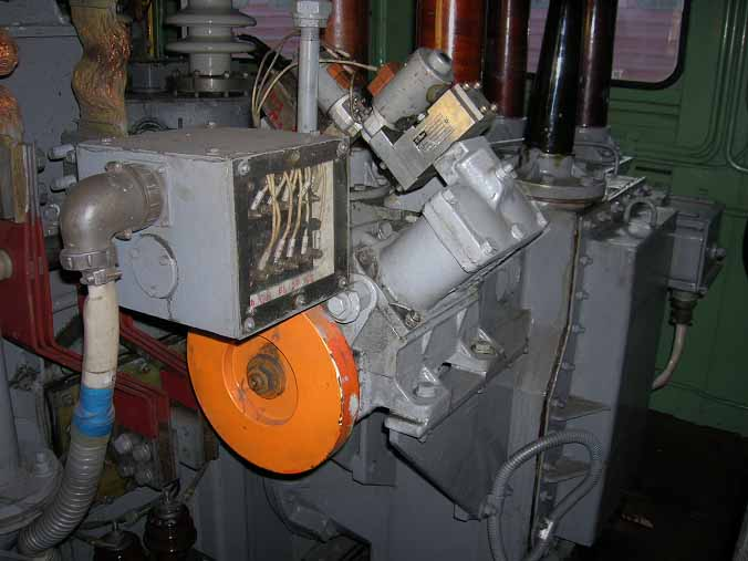 Пневмодвигатель переключателя ступеней, электровоз ЧС4Т